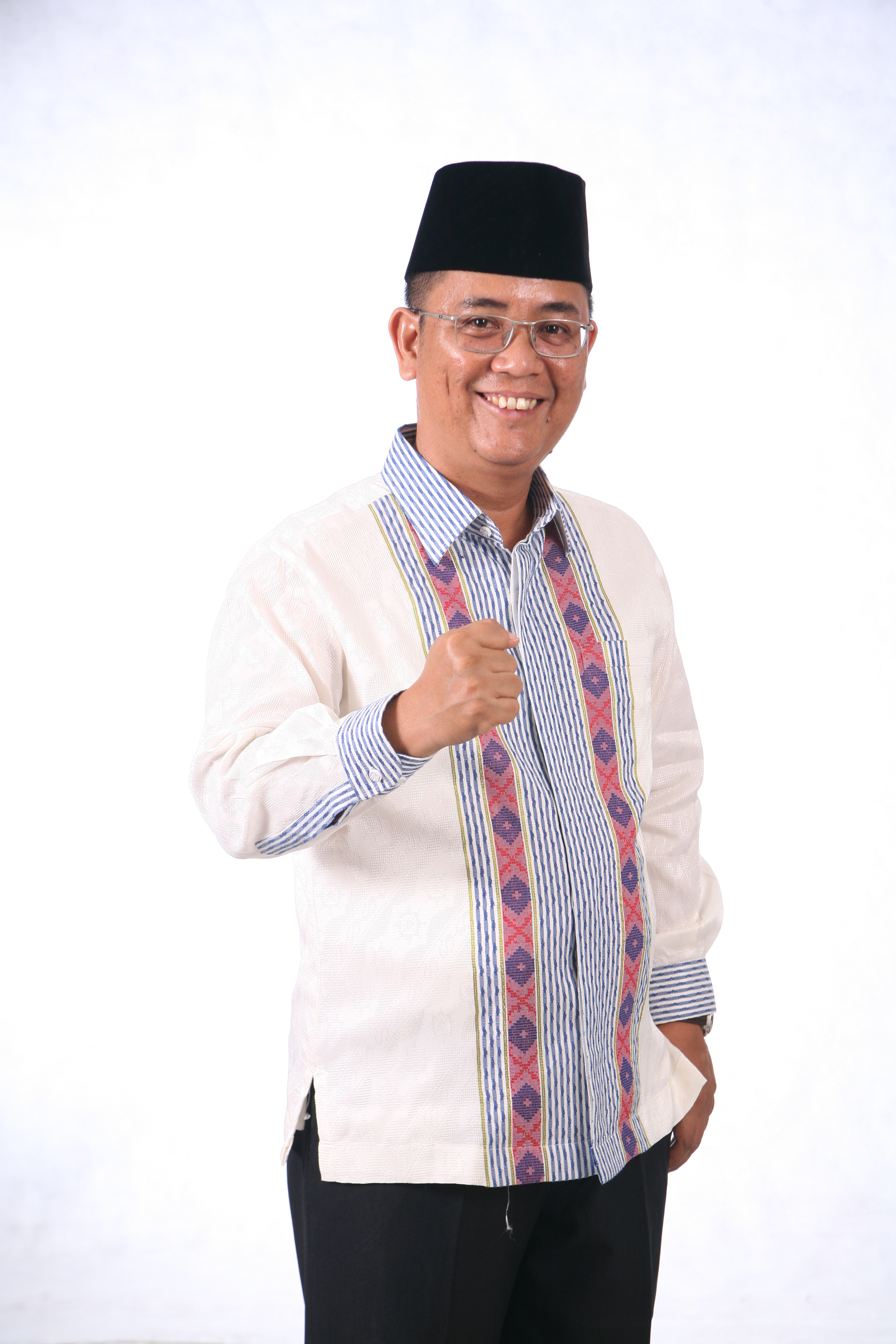 Budi Artiful seorang pengusaha di Kabuapaten Pelalawan